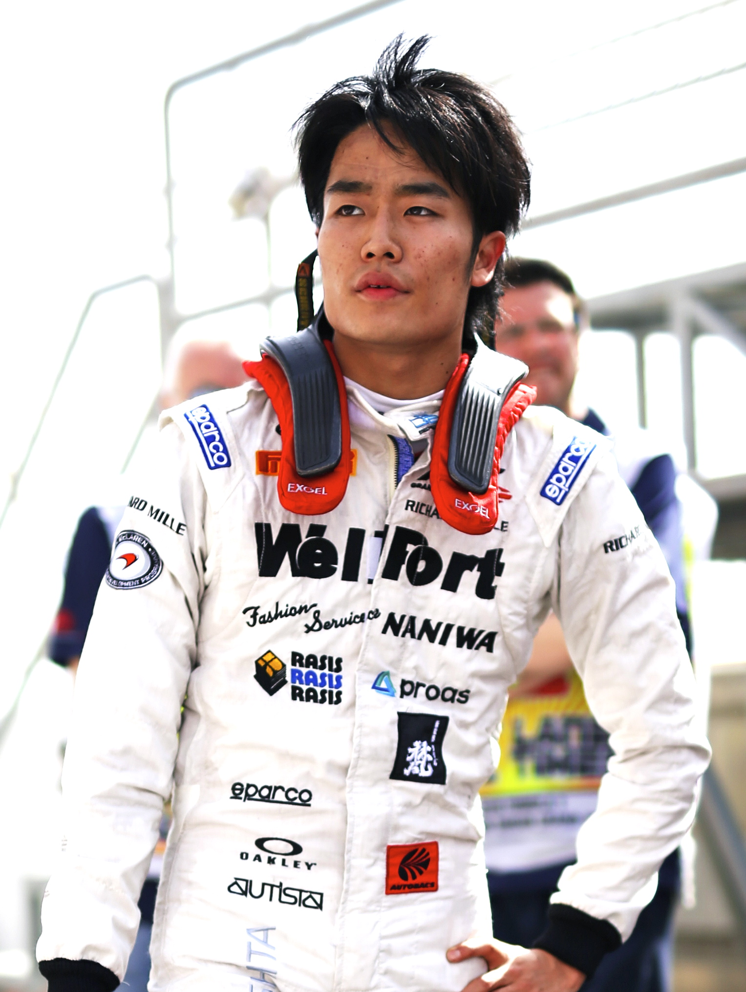 2015年バーレーンGP